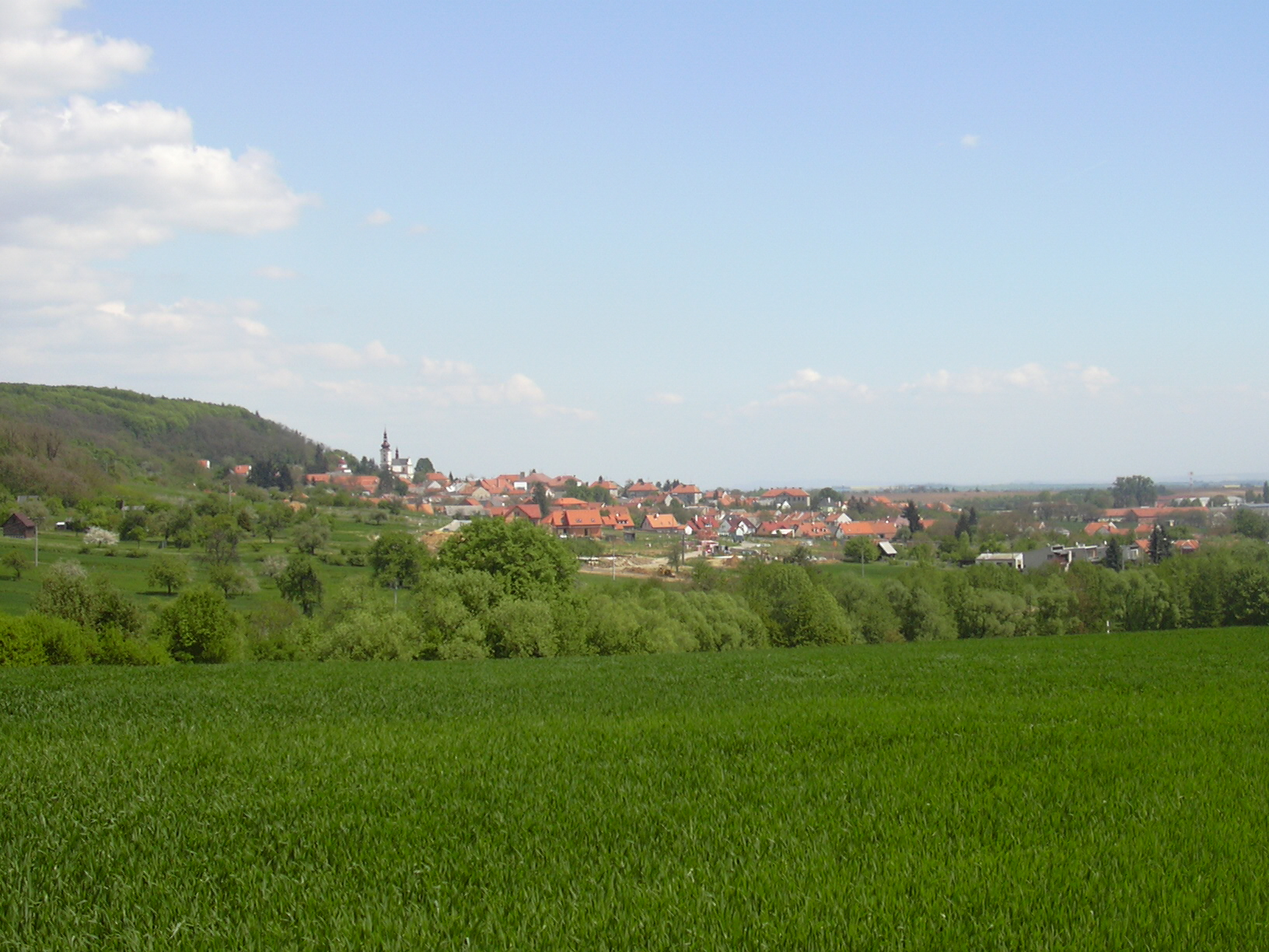 Pustiměř